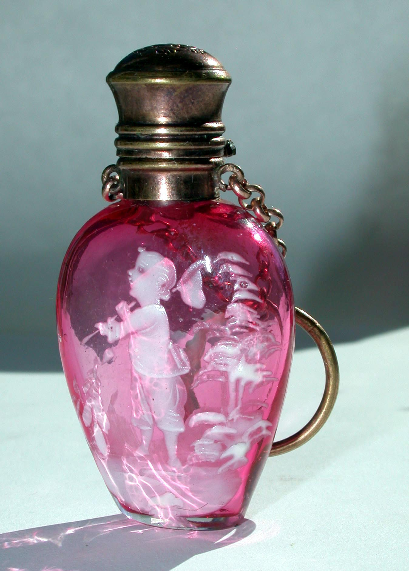 Flacon à sels Mary Gregory